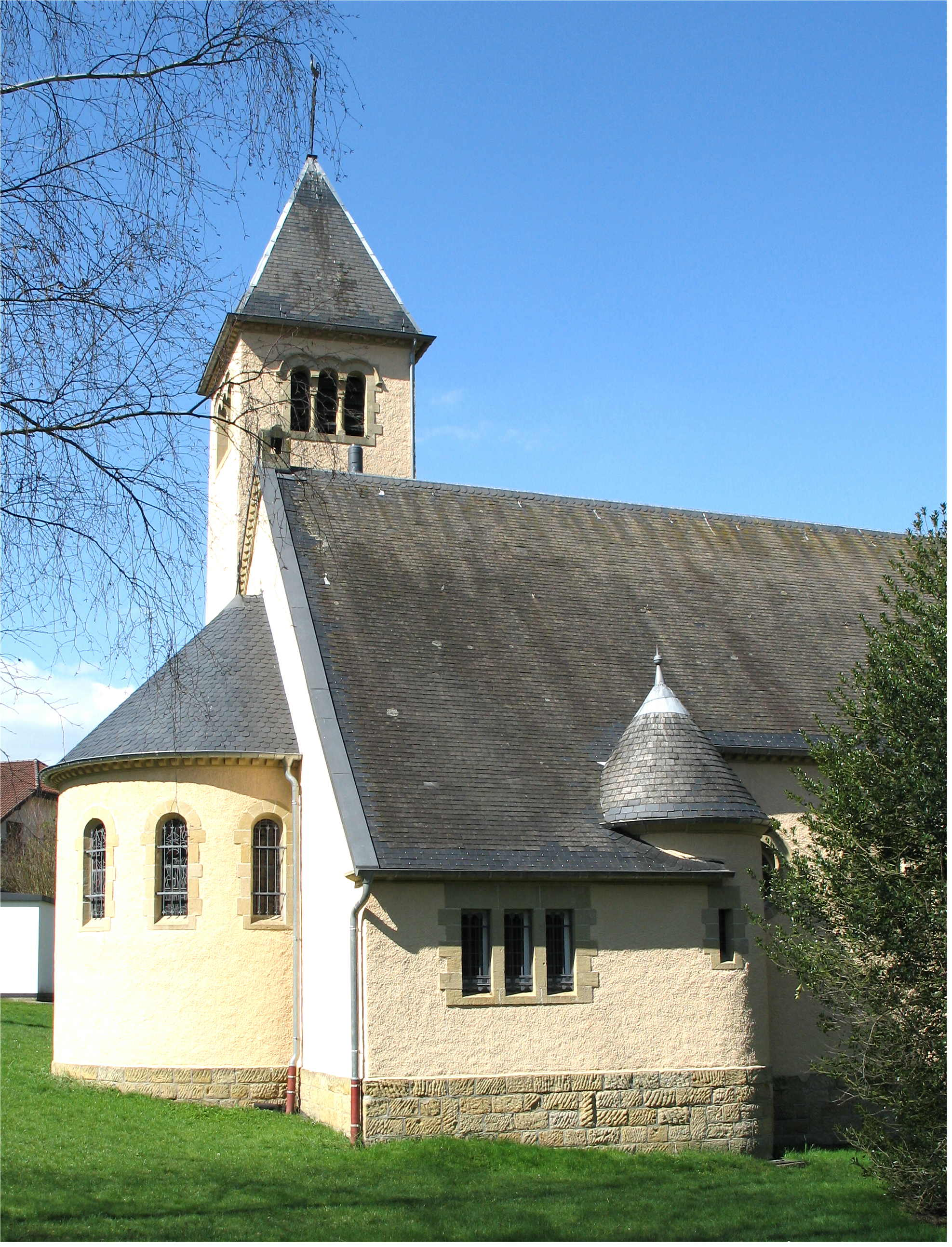 Kierch zu Déiljen (Abrëll 2006)